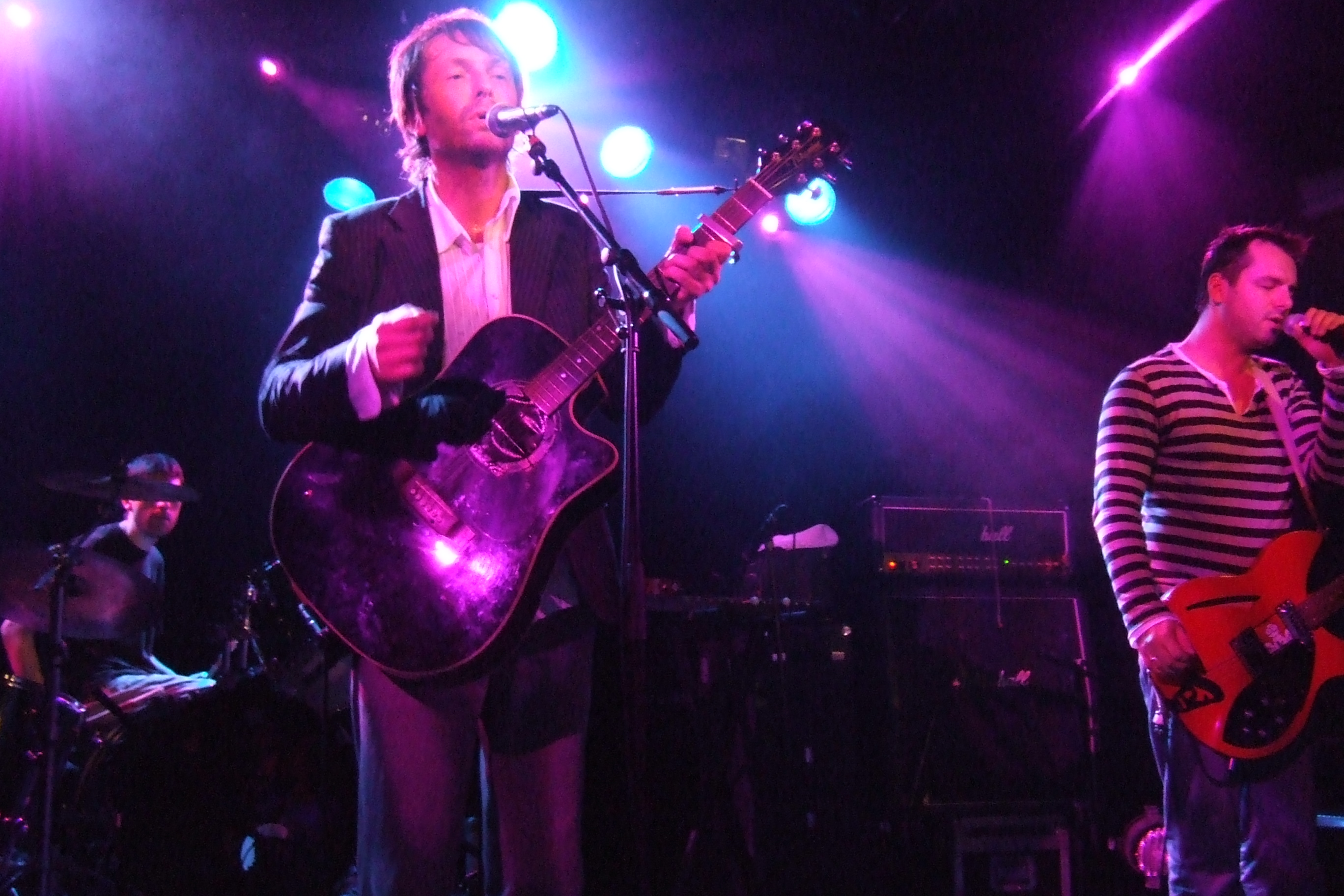 Kaolin en concert à La Laiterie à Strasbourg le 27 novembre 2006